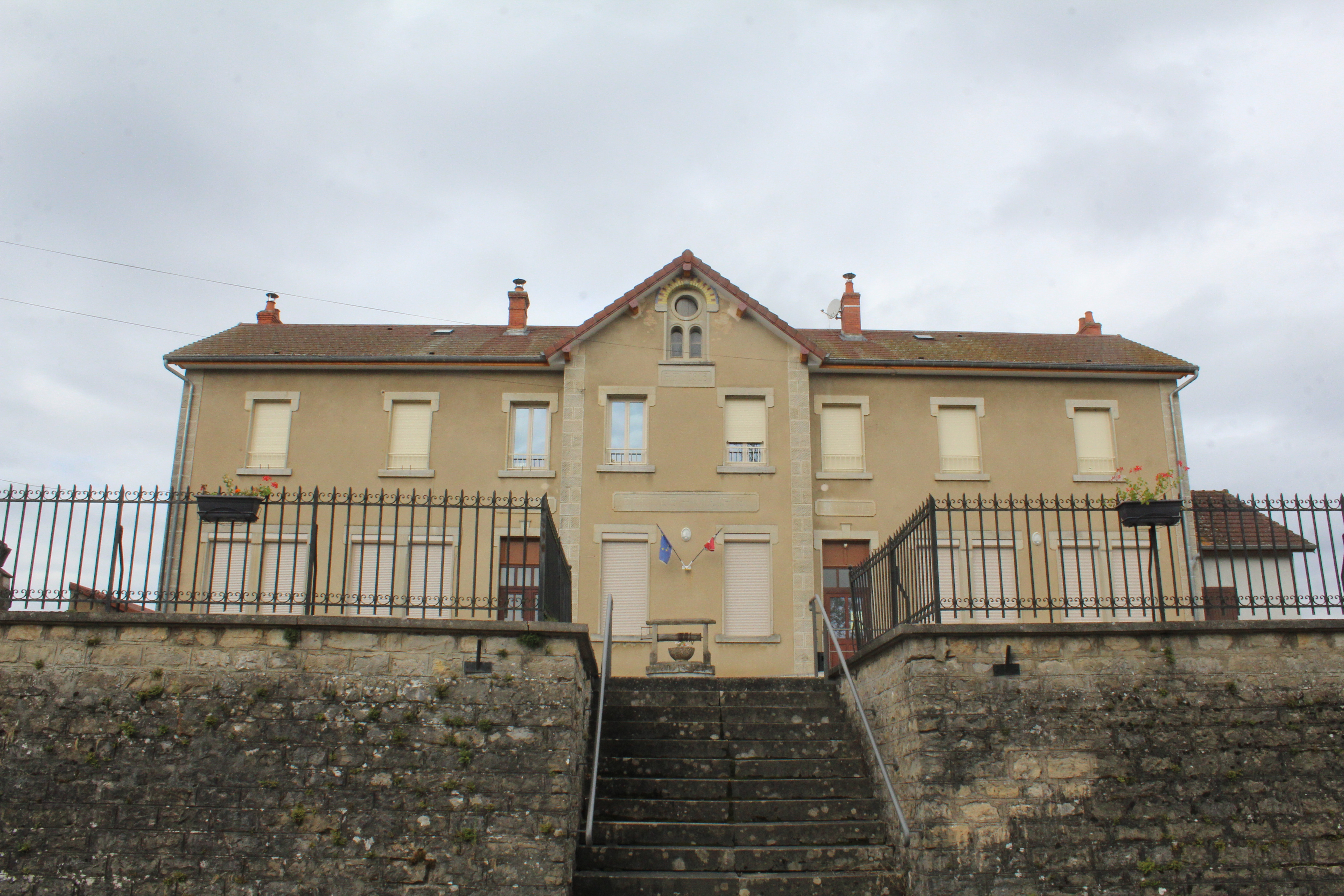 Mairie des Deux-Fays.